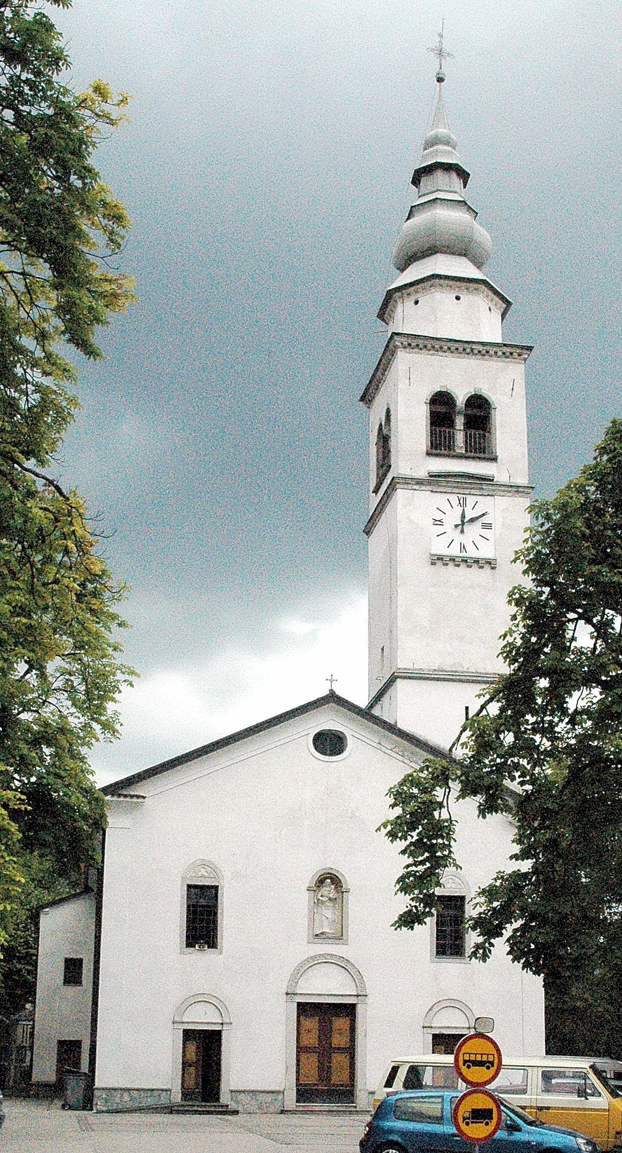 Church Holy Mary (cerkev Marijinega vnebovzetja) at Tolmin, Slovenija